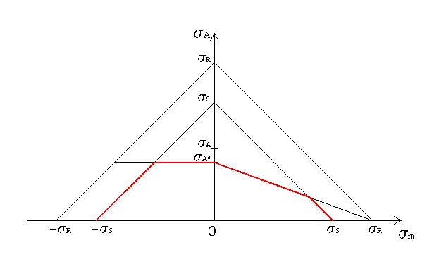 diagramma di haigh